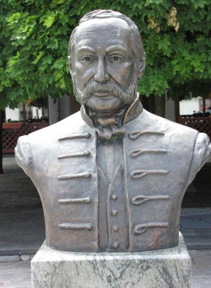 Αναμνηστικό γλυπτό στο Herend του Mór Fischer Farkasházi